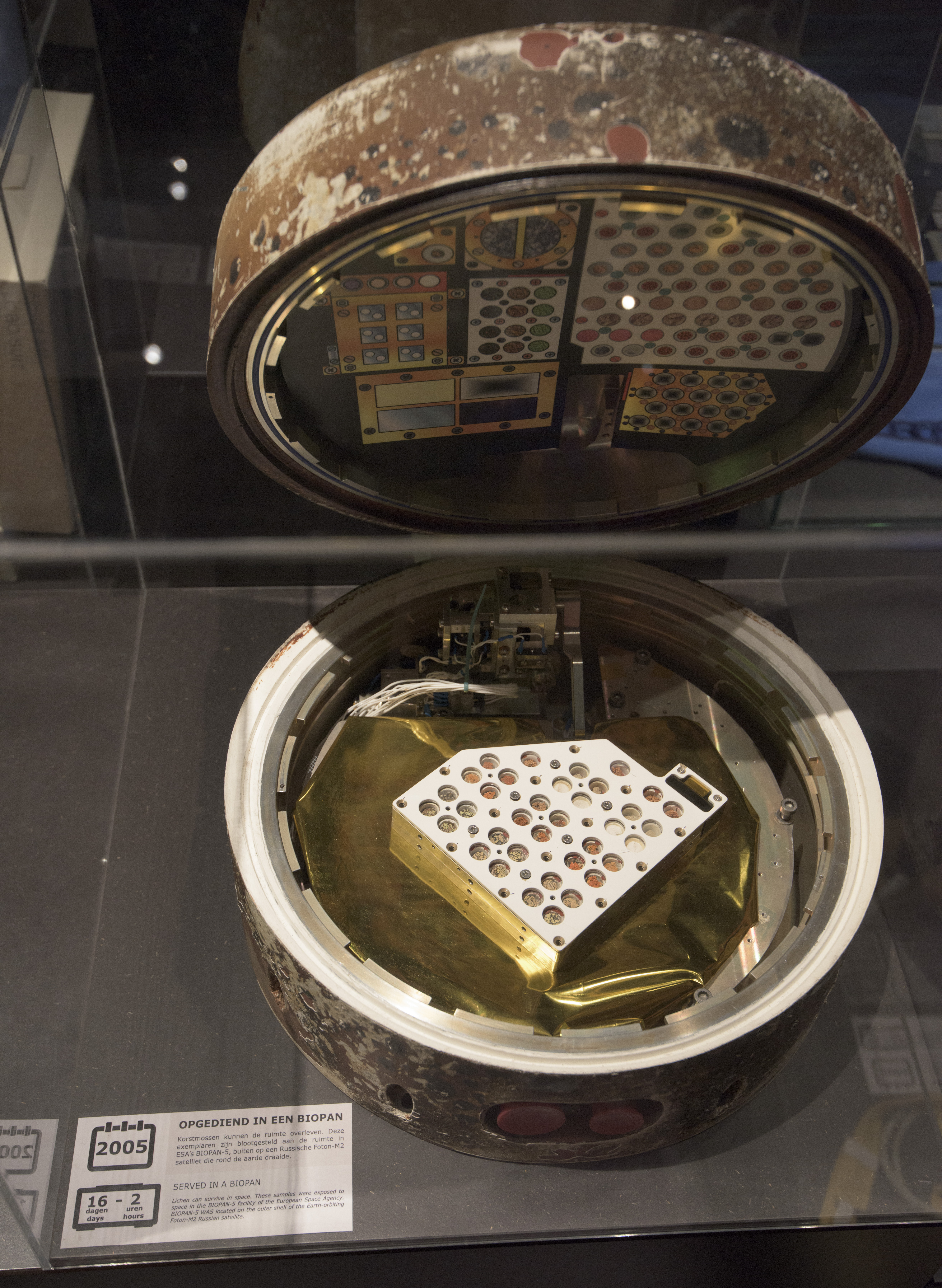 Experiment BIOPAN-5 onderdeel van de Foton-M2 missie waarbij korstmossen overleefden in de ruimte.